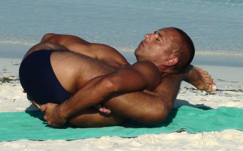 Сидерский Андрей Владимирович